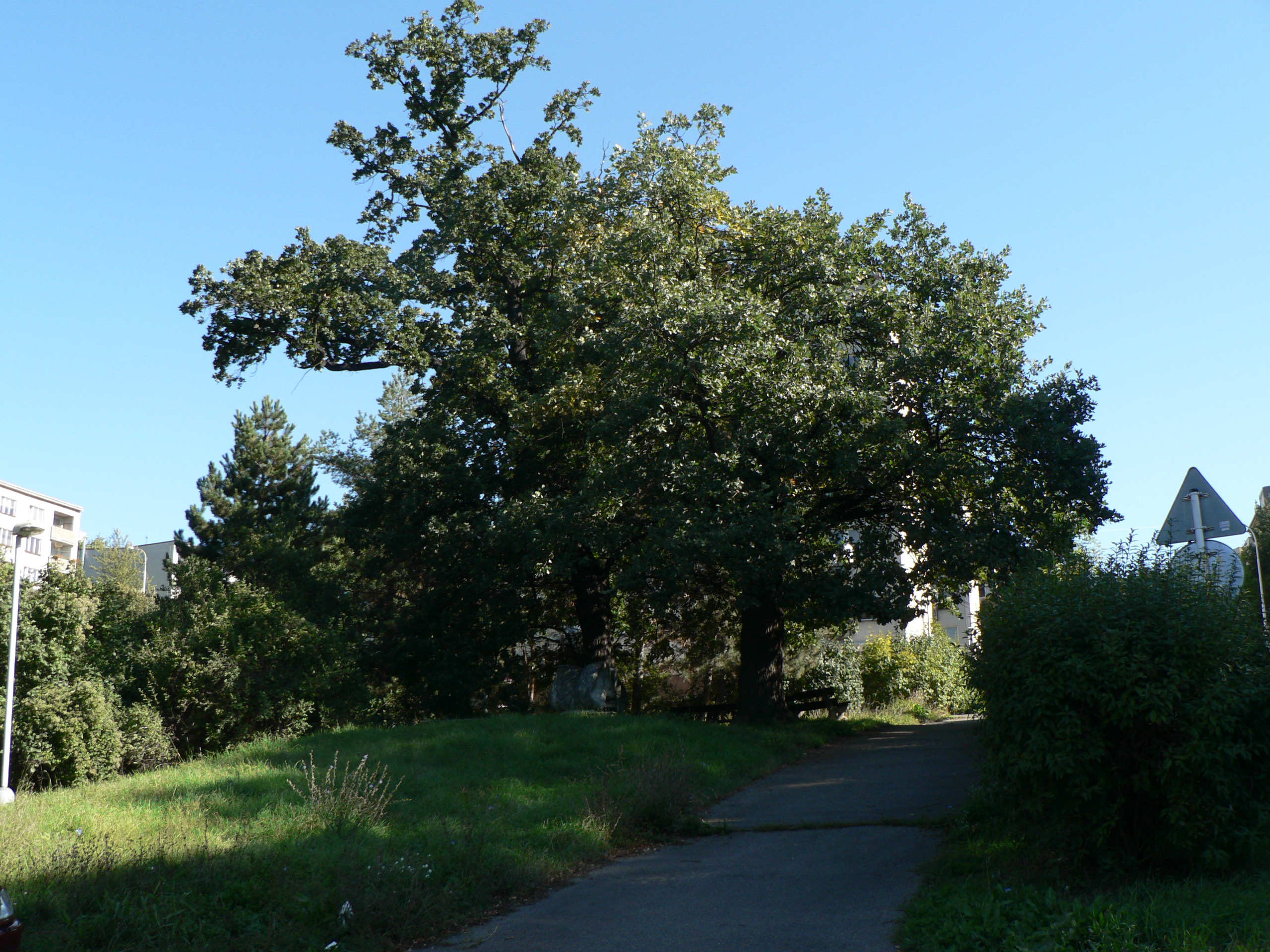 Dva památné stromy (dub letní) v ul. Mezivrší, Praha - Braník.